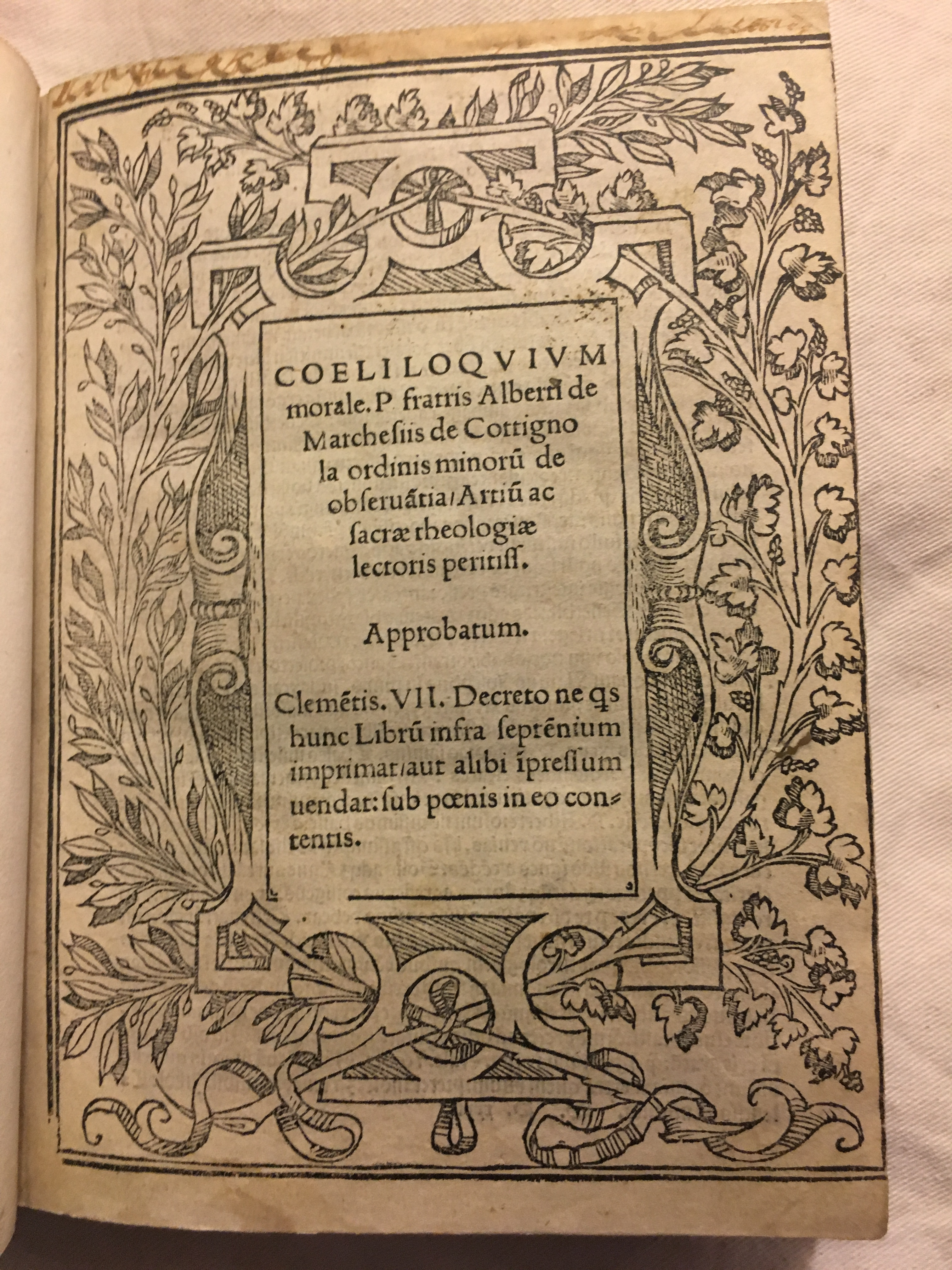 Foto della prima pagina del testo di Alberto da Cotignola custodito presso la Royal Astronomical Society a Londra